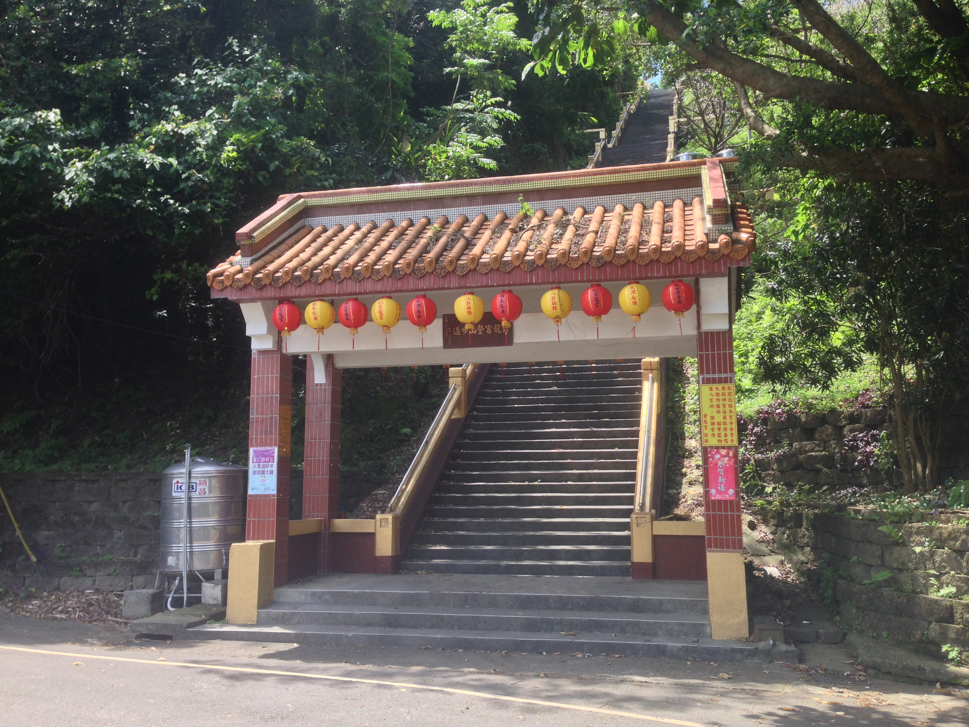 鶯歌碧龍宮在龜公山上。